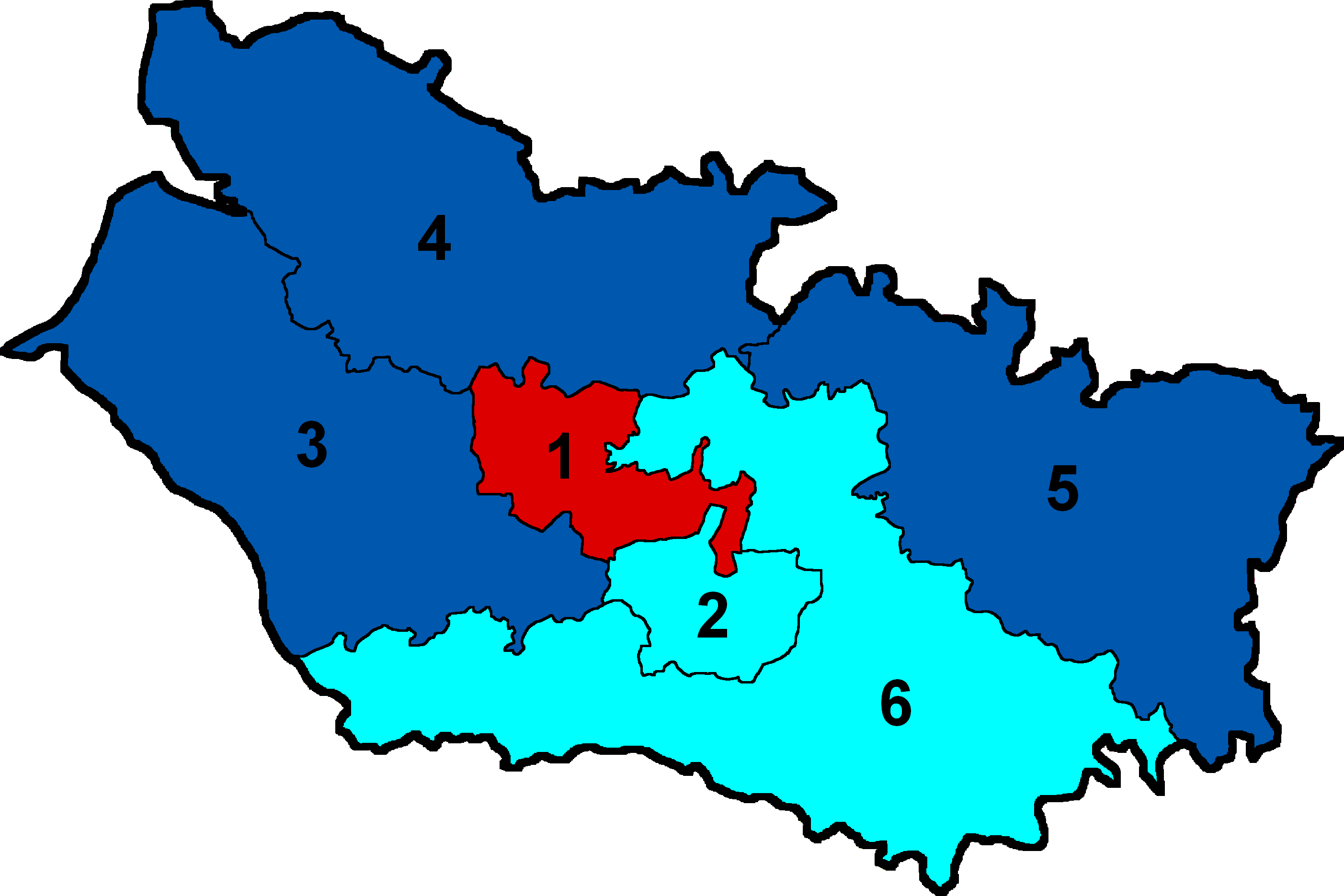 Députés de la Somme en 1992